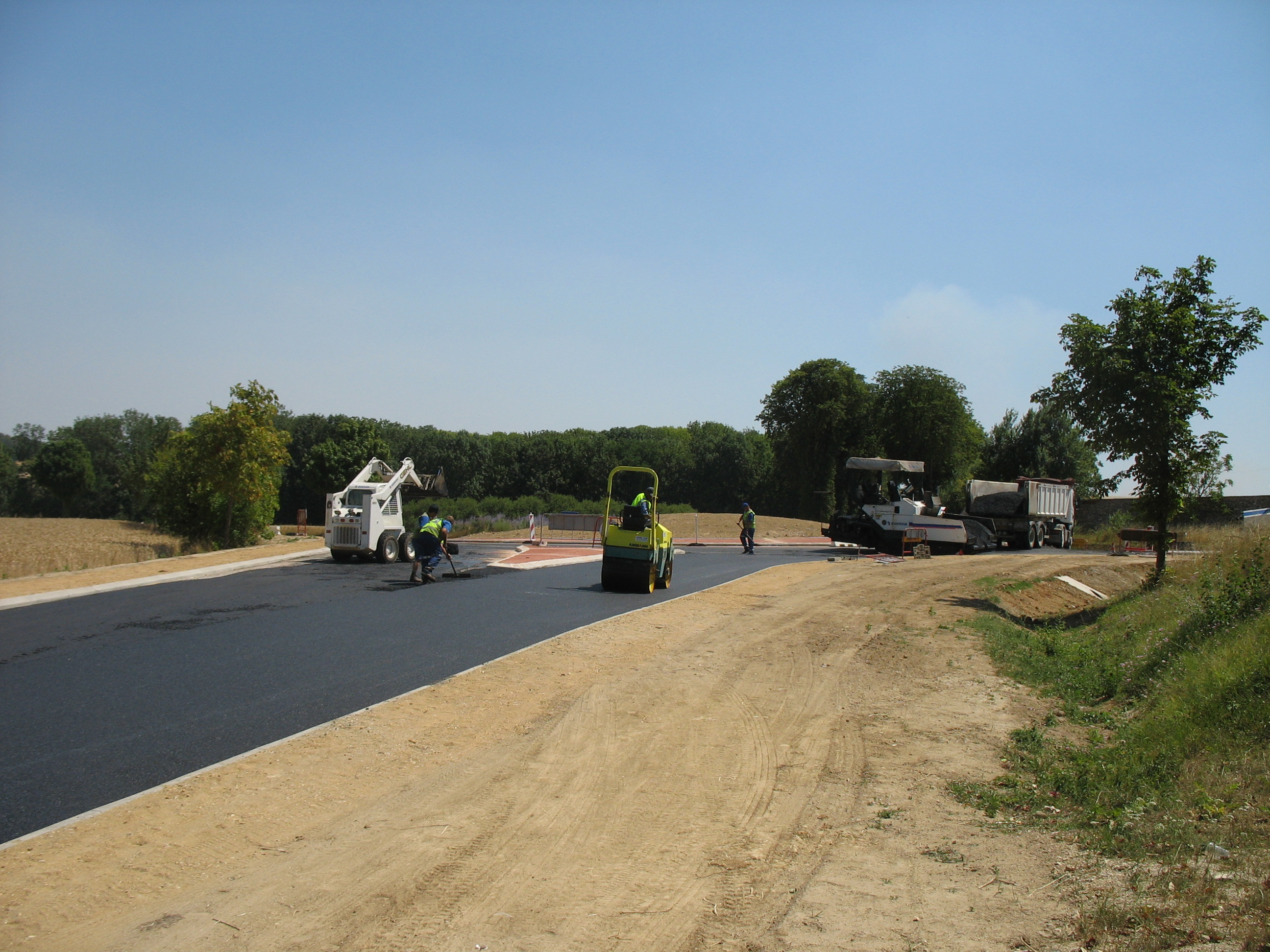 Cette photo a été prise par moi-même.